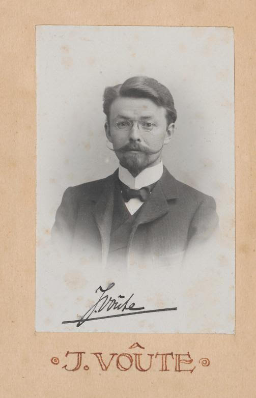 Joan George Erardus Gijsbertus Voûte (Madioen, 7 juni 1879 – Den Haag, 20 augustus 1963) was een Nederlands astronoom.